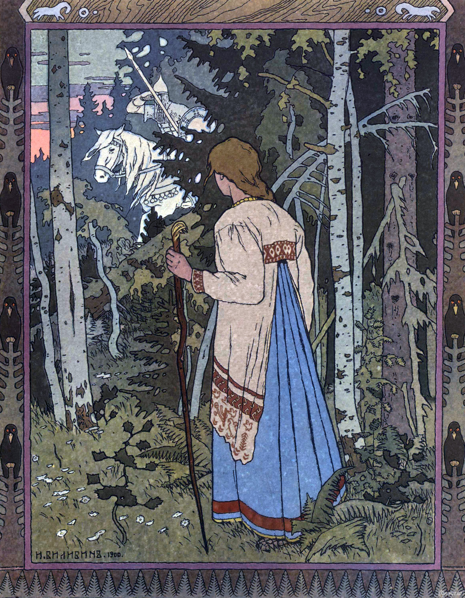 Белый всадник. Иллюстрация к сказке «Василиса Прекрасная»